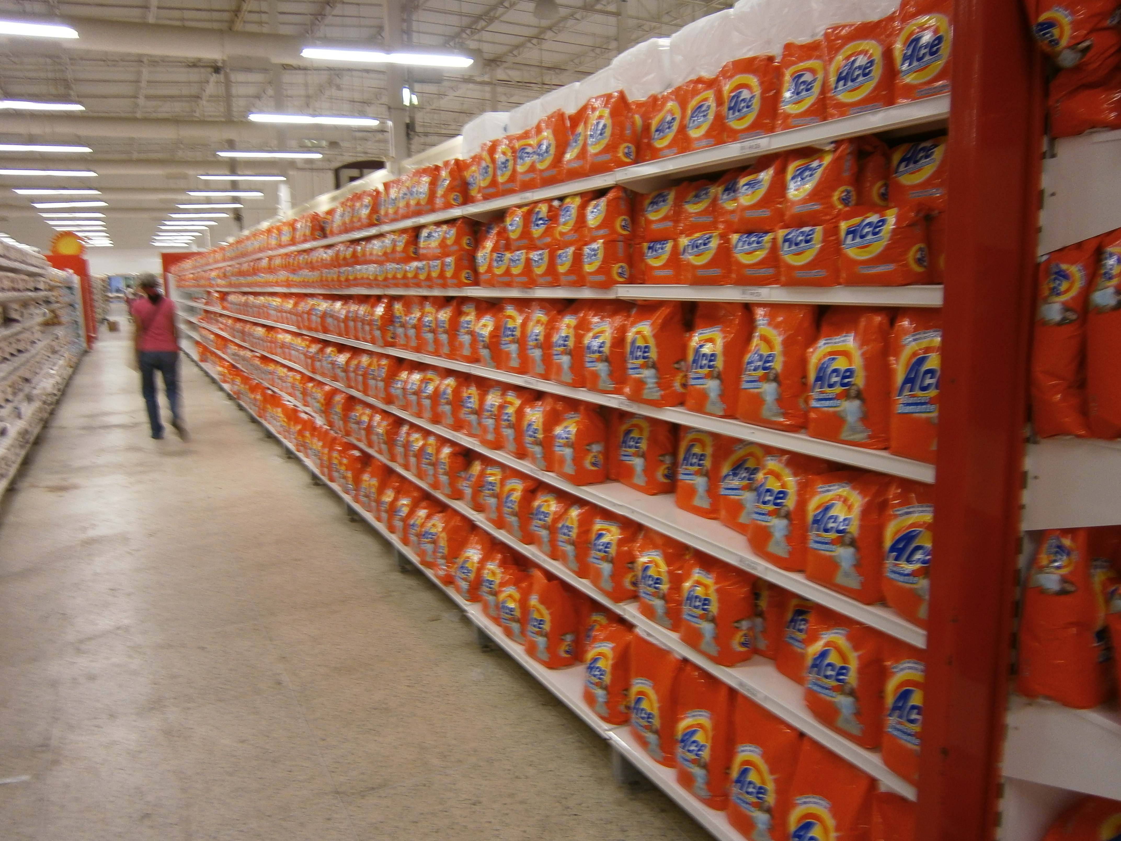 Escasez en Venezuela, Sigo